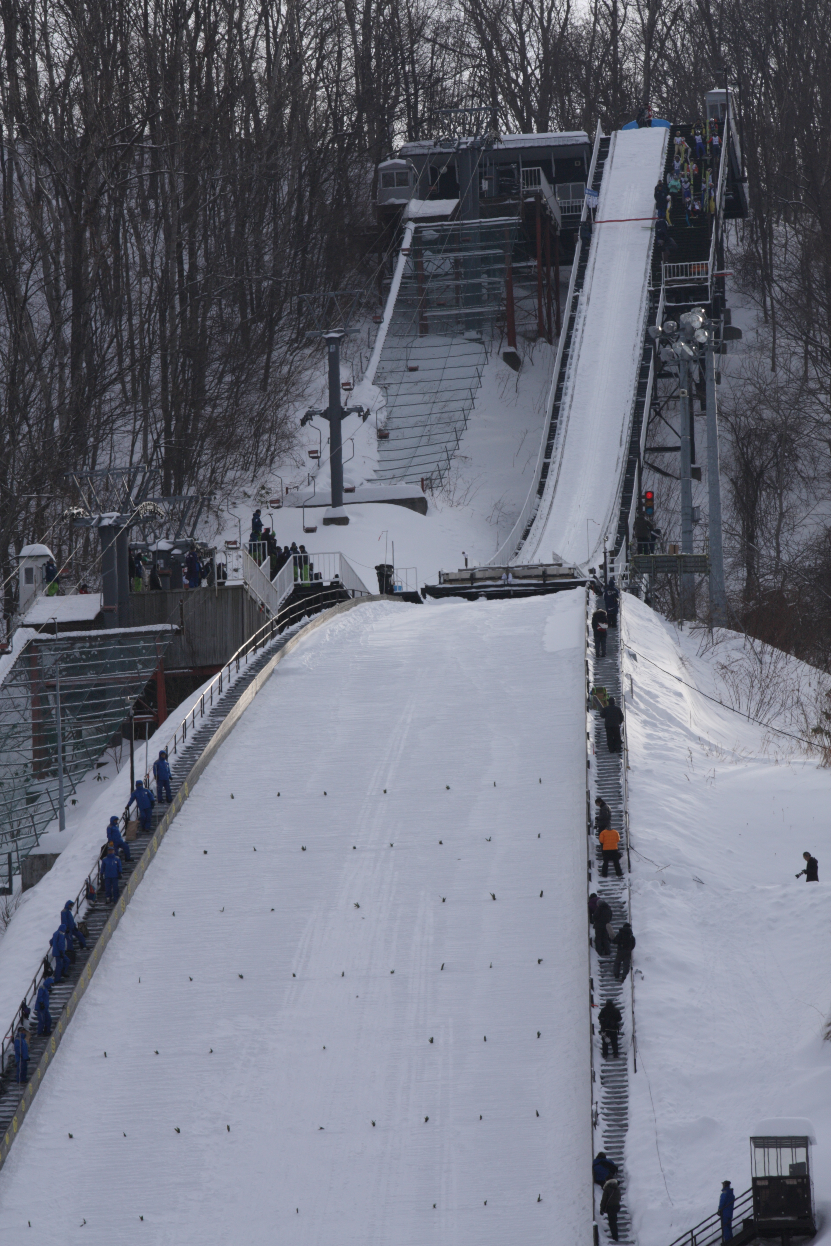 Miyanomori ski jumping hill in Sapporo, Japan